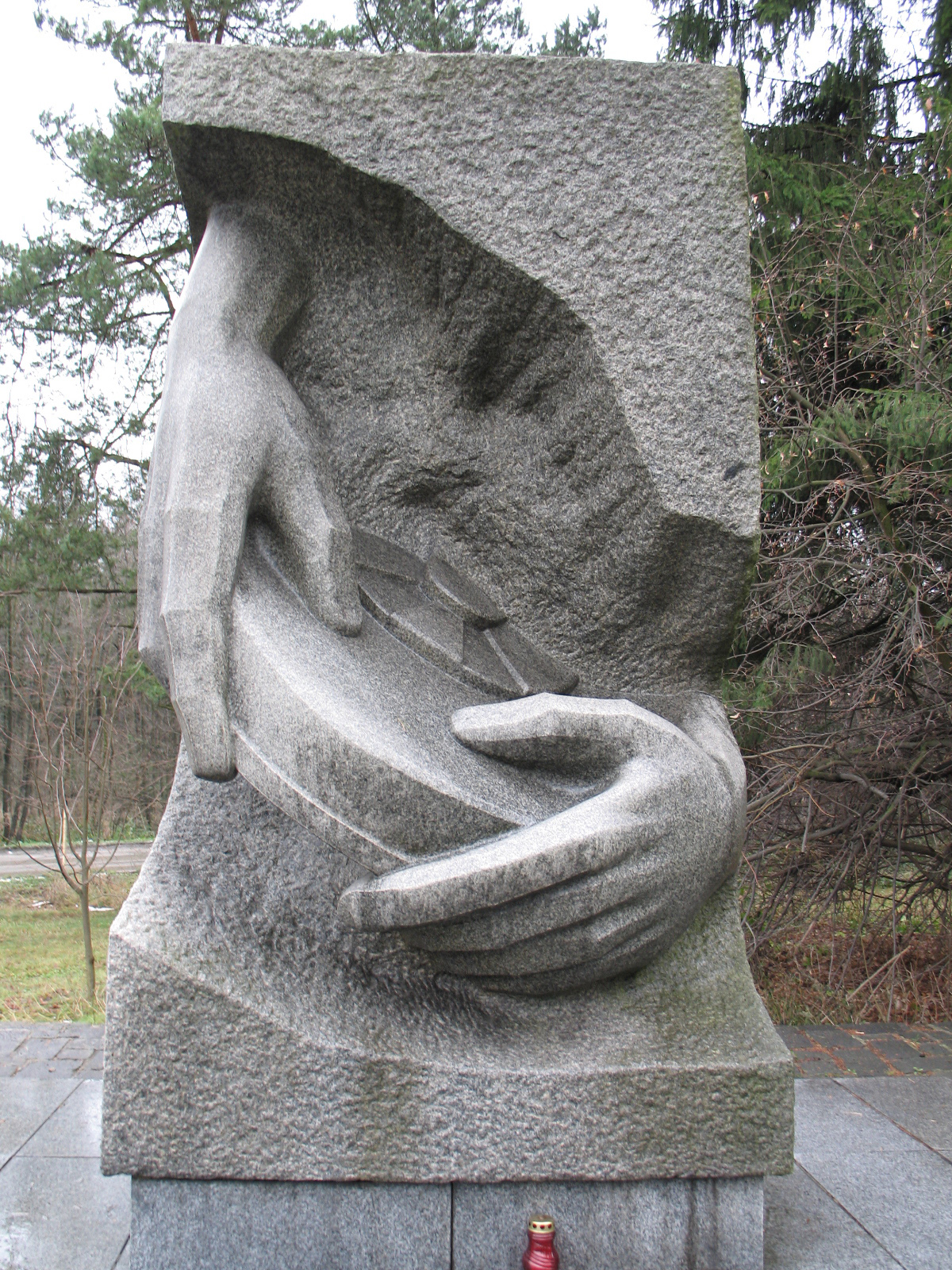 Žulový pomník ženijného vojska odhalený na Dukle v roku 1967 je vysoký 320 cm. Je dielom zaslúžilého umelca V. Löfflera a národného umelca A. Račku